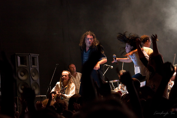 Концерт до Дня Незалежності (Львів, 2011)